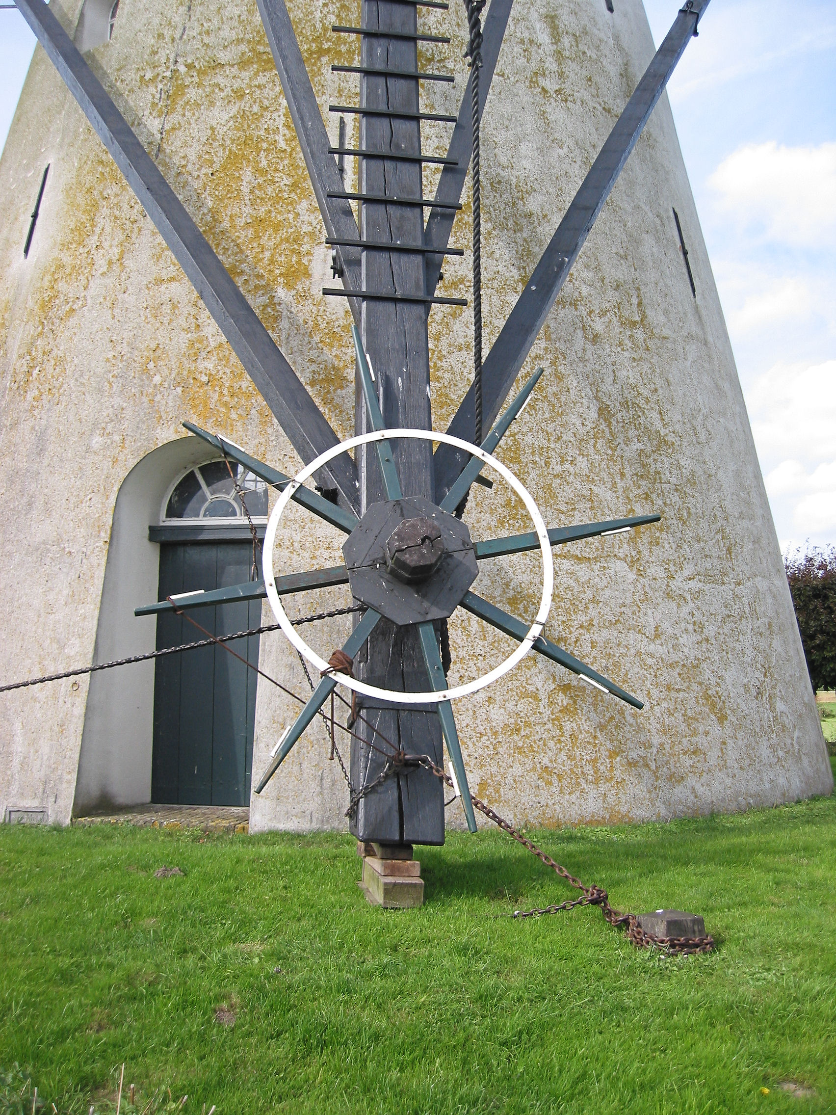 Kruispil poldermolen De Marsch Lienden, Gelderland, the Netherlands